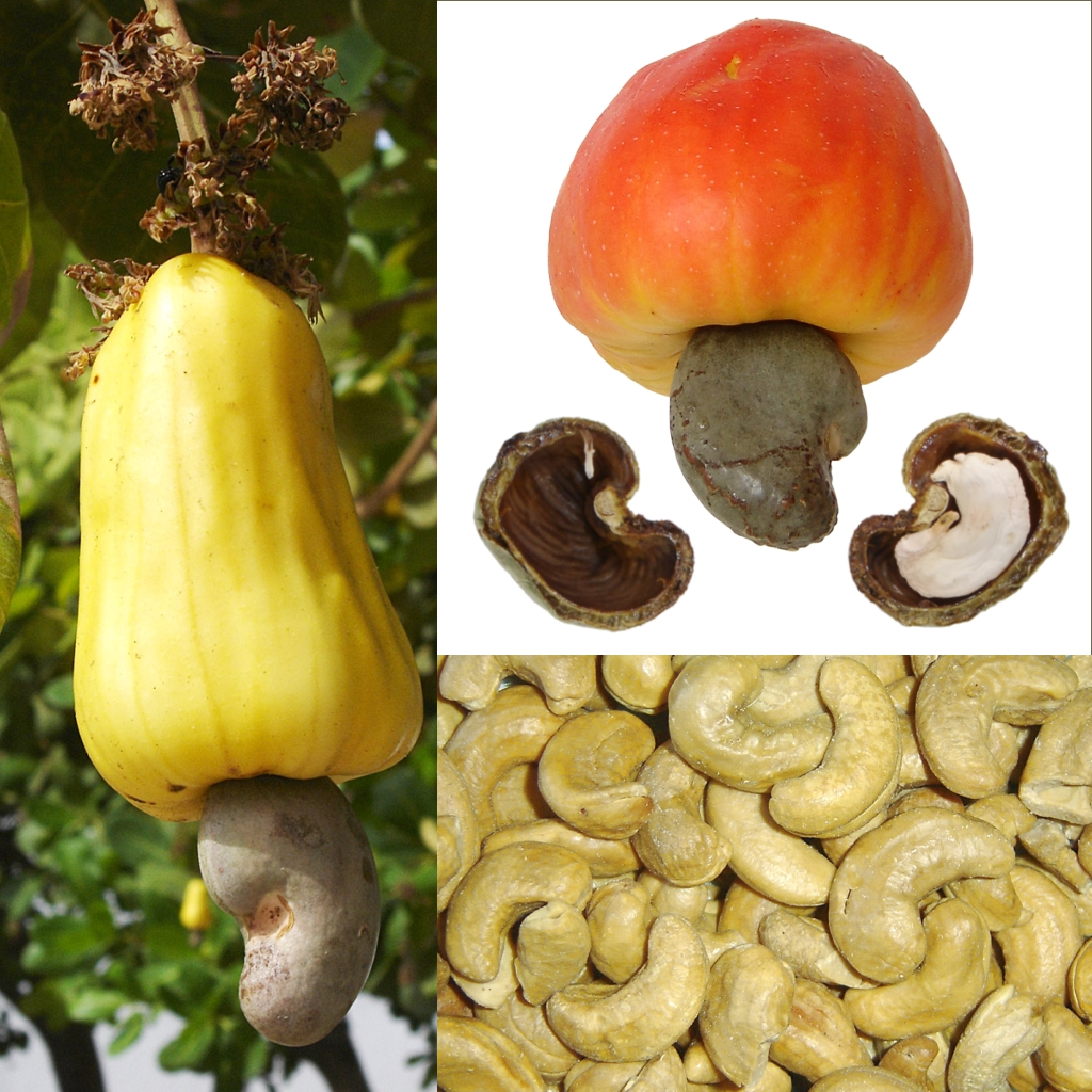 Grafika podręcznika Wikijunior:Owoce. Nanercz; jabłko nanerczowe i orzech nanerczowy (nerkowiec), części owocu nanercza zachodniego (Anacardium occidentale).